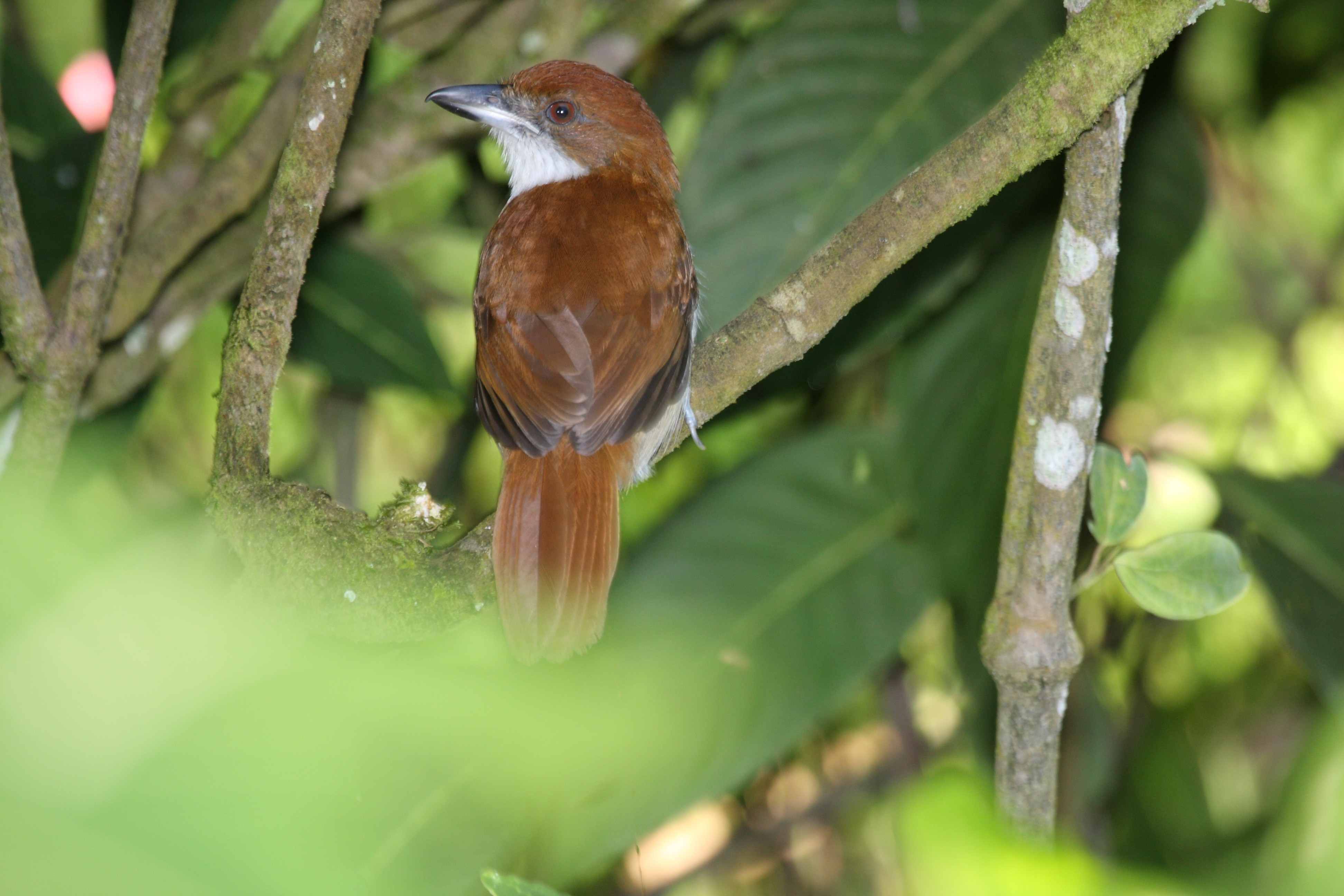 Great Antshrike Taraba major female, Trinidad & Tobago